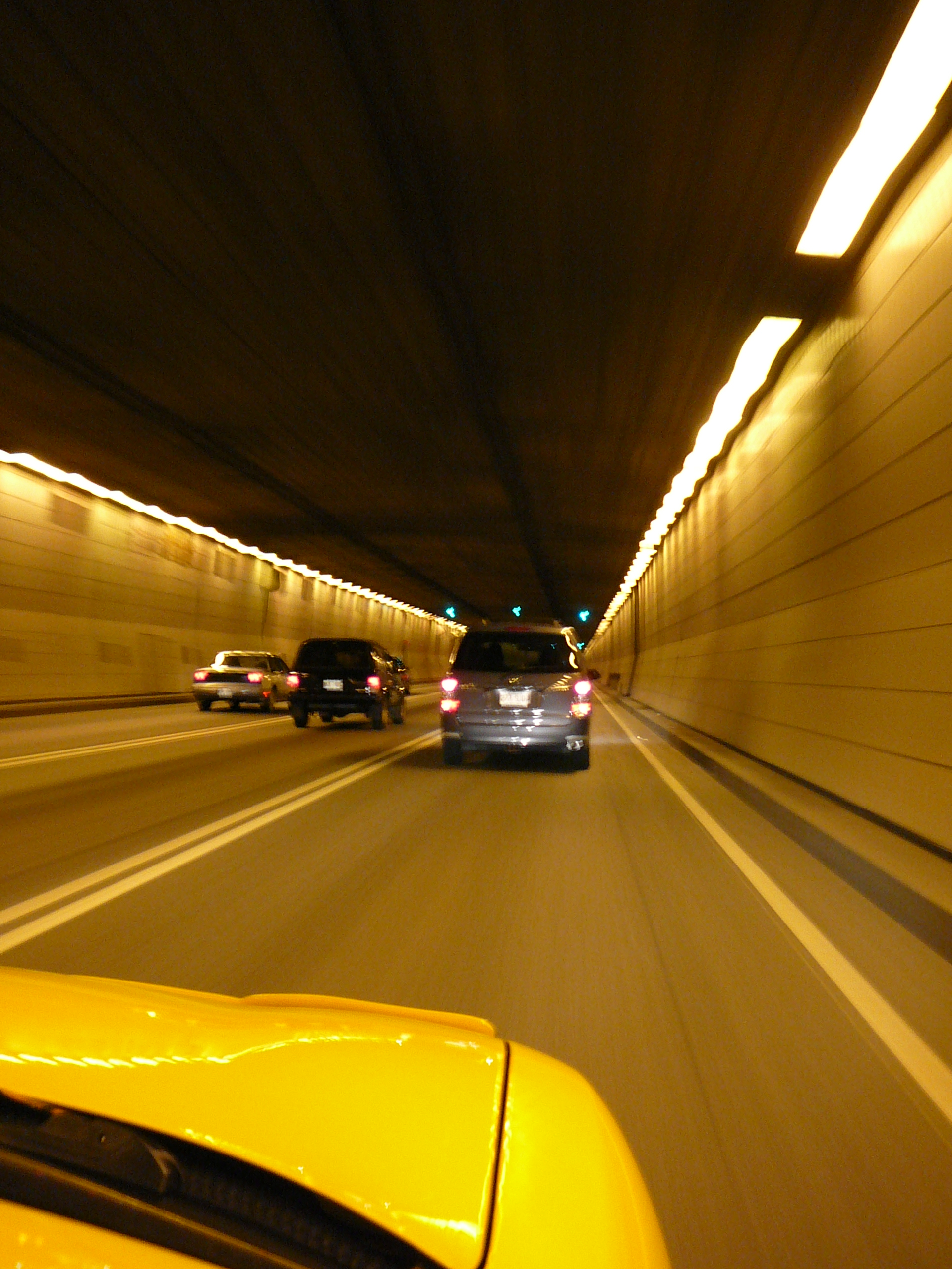 Photo dans le tunnel Louis-Hyppolite-Lafontaine , Montreal , Canada